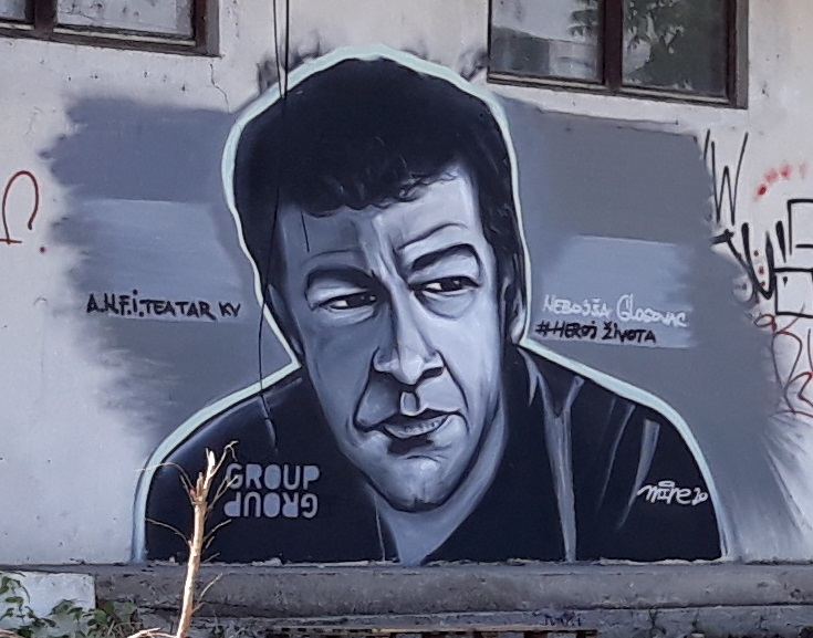 Мурал у Краљеву посвећен Небојши Глоговцу.